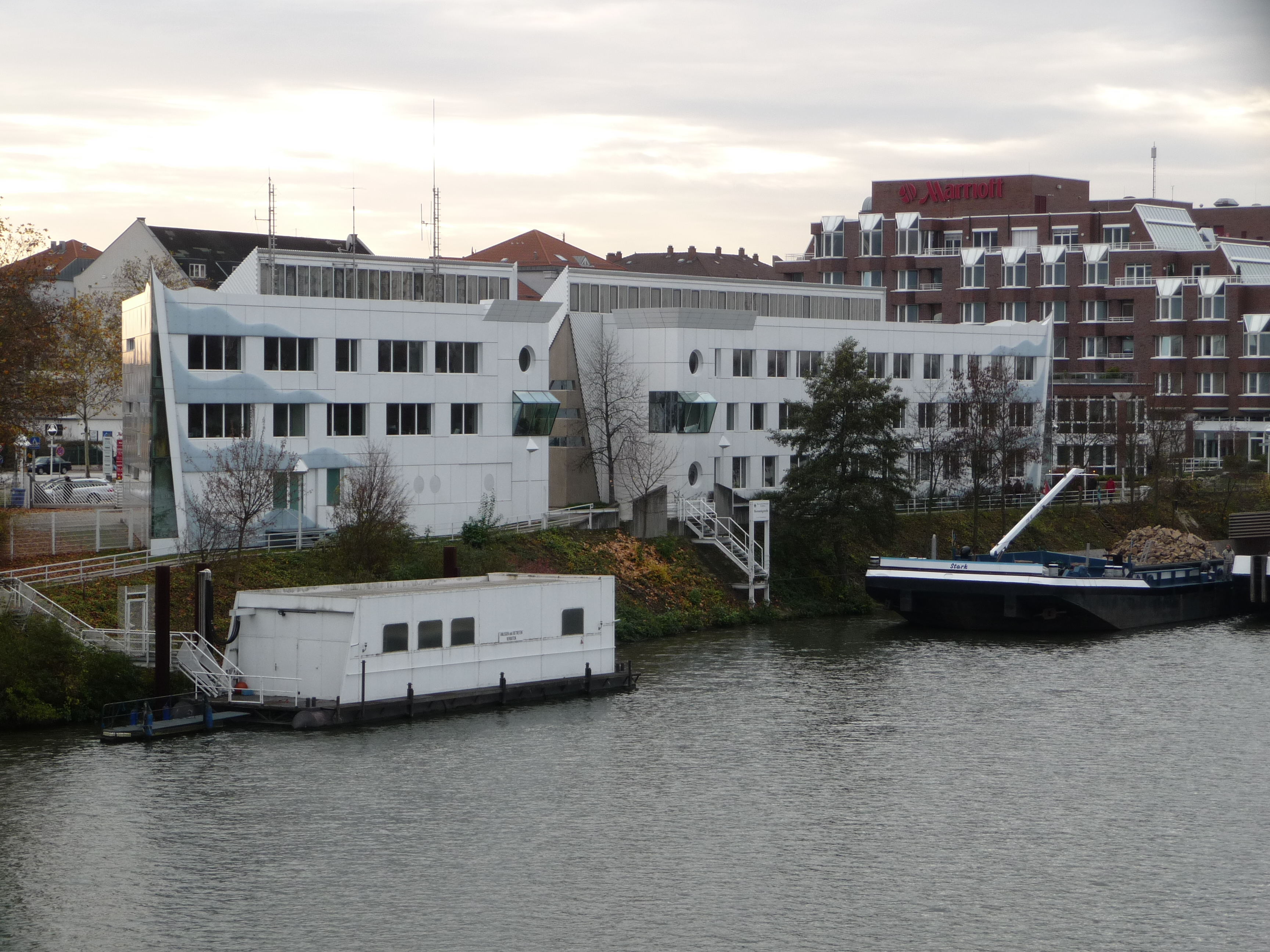 Gebäude des Wasser- und Schifffahrtsamtes sowie der Wasserschutzpolizei in Heidelberg (Baden-Württemberg, Deutschland)